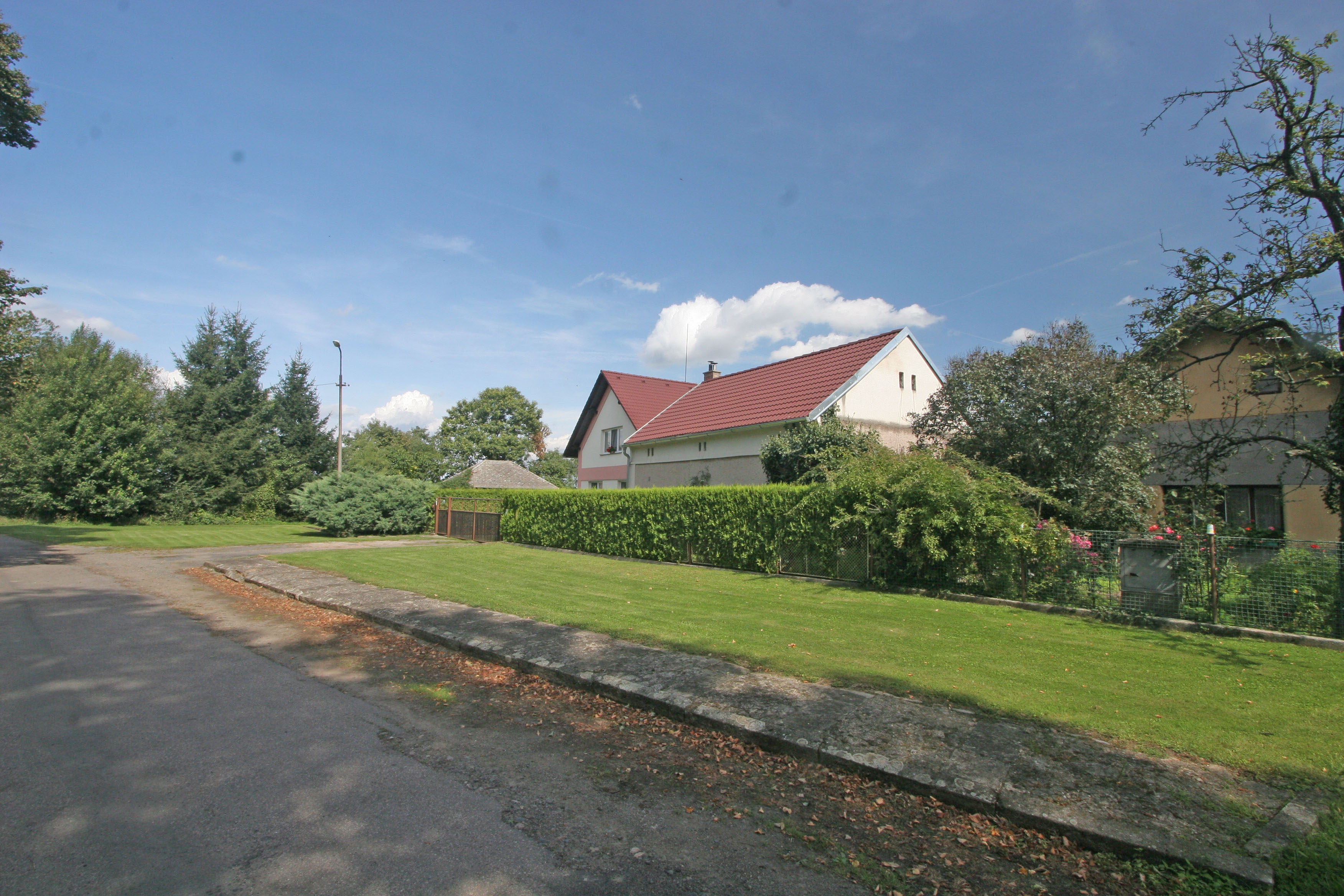 Bumbalka čp. 1